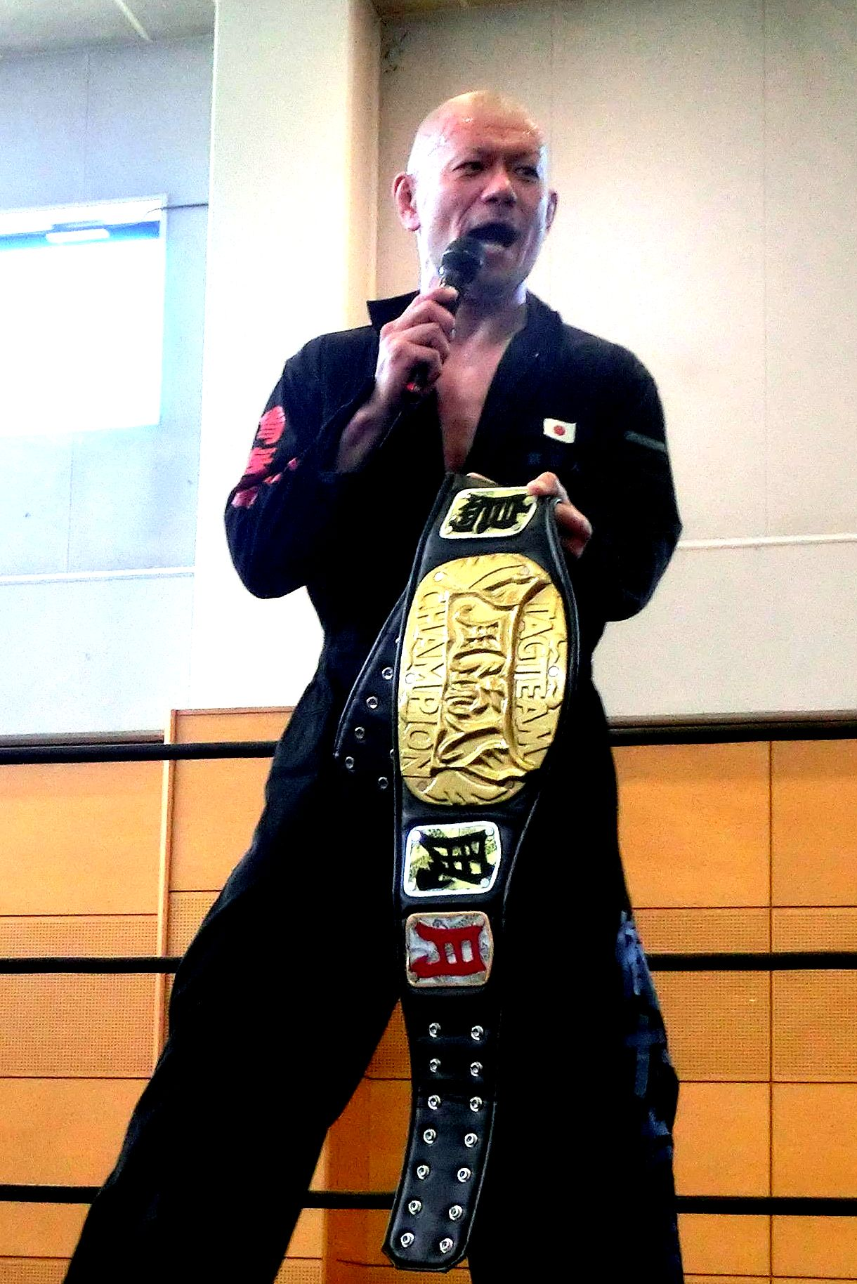 KENICHIRO ARAI